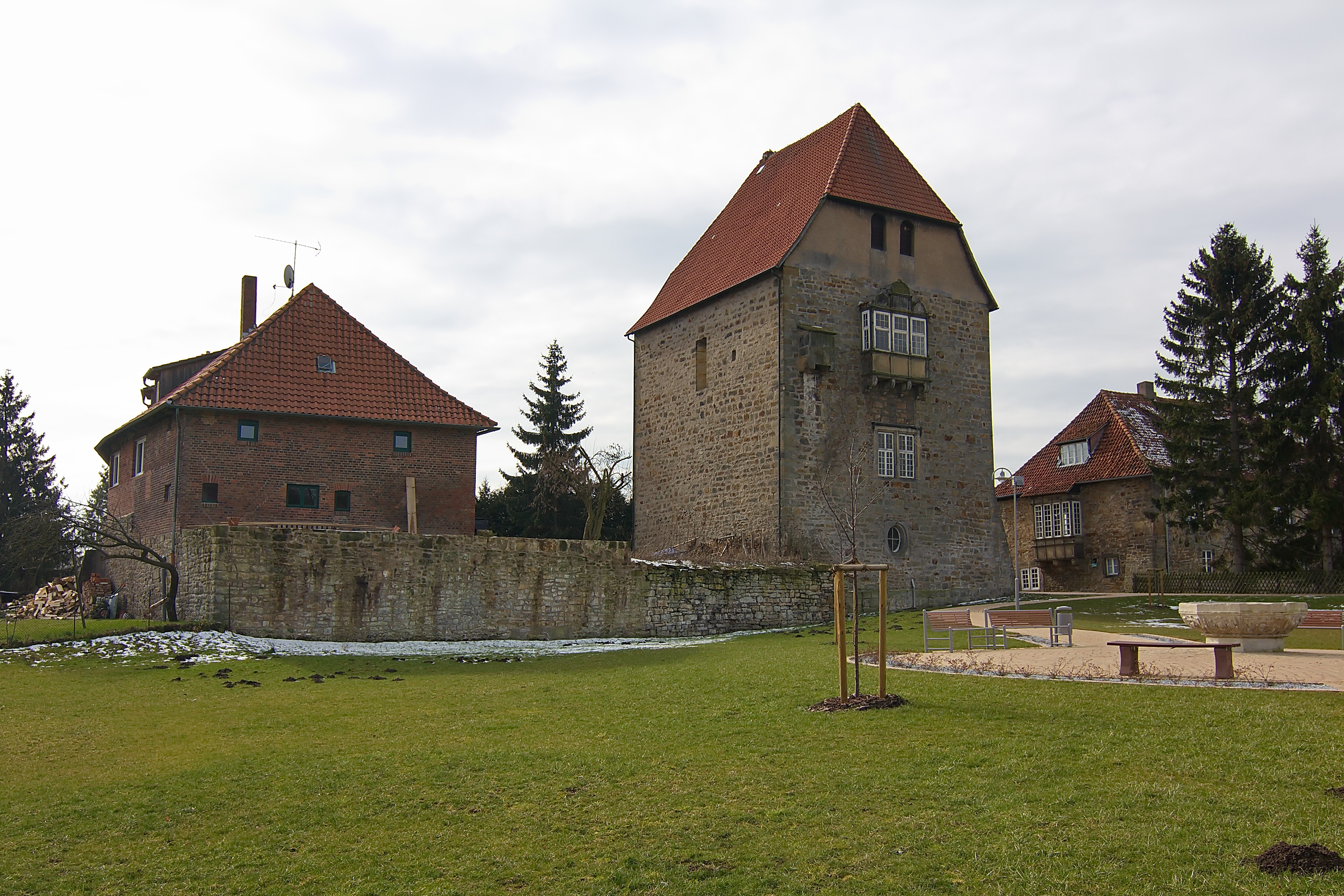 Wasserburg Sachsenhagen von 1250 in Sachsenhagen, Niedersachsen, Deutschland